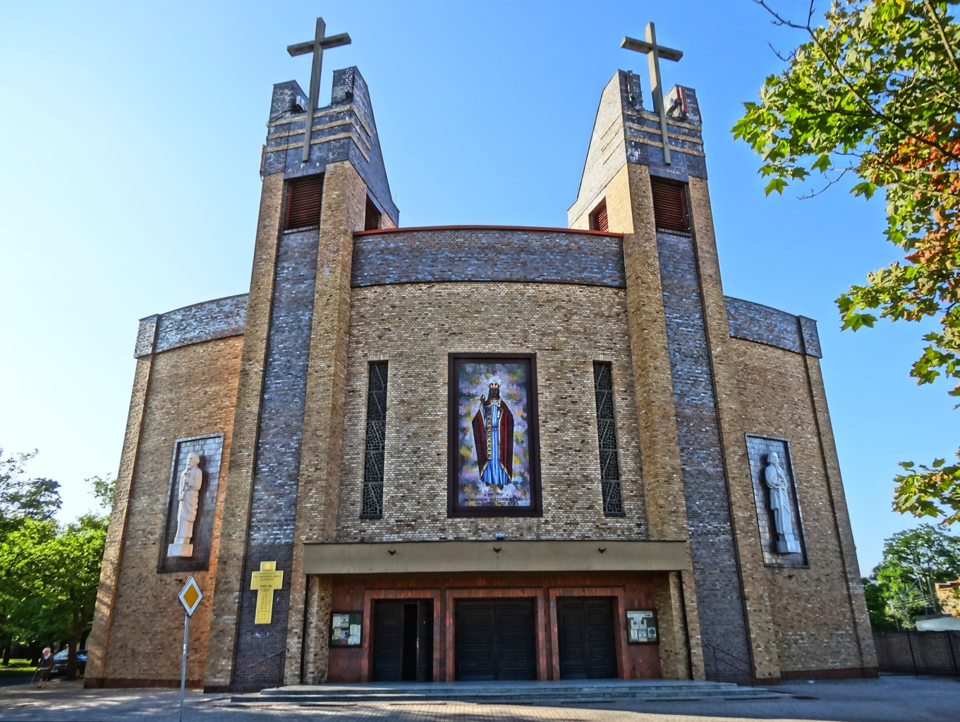 Kościół p.w. Chrystusa Króla na osiedlu Błonie w Bydgoszczy